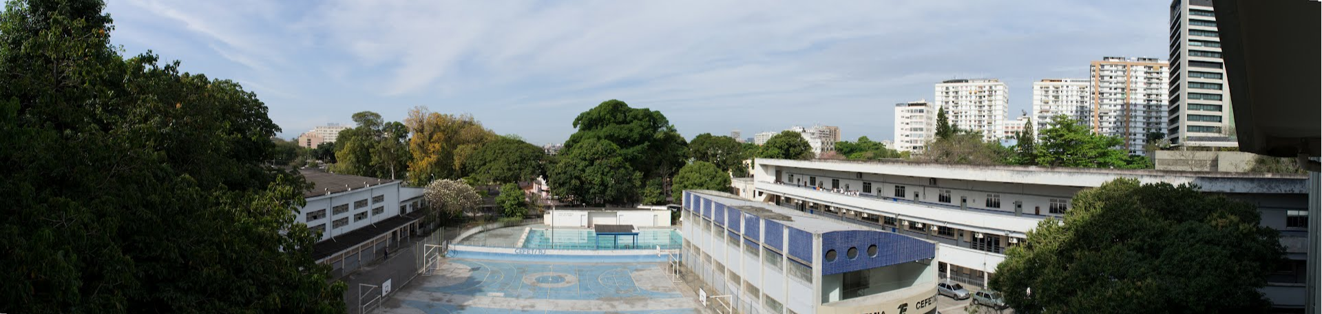 Panorâmica